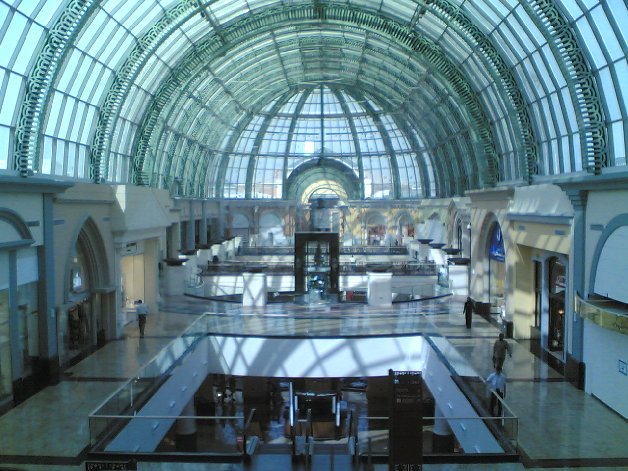 Original description: Speechless, its size is huge.